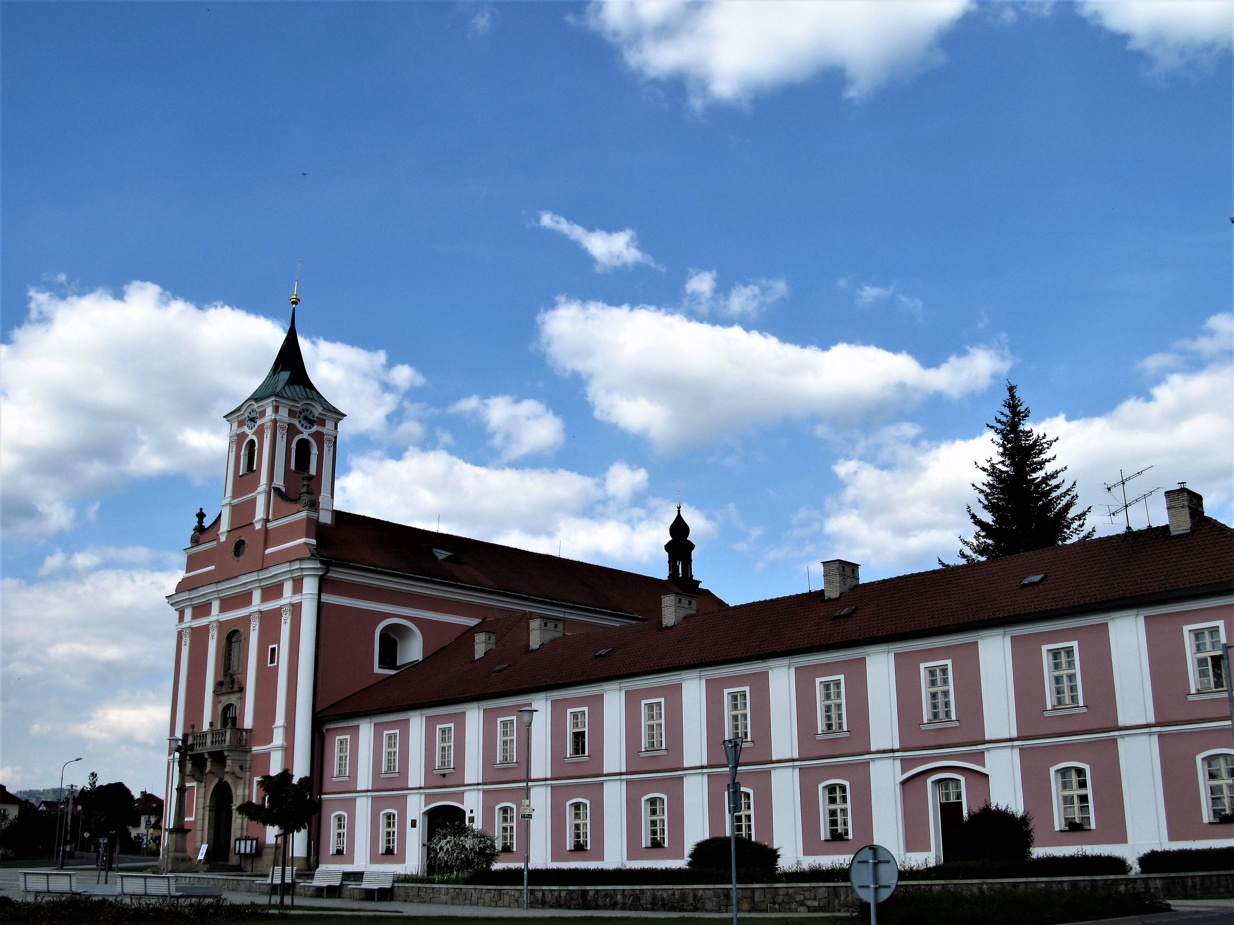 Komplex poutního kostela Narození Panny Marie s karmelitánským klášterem